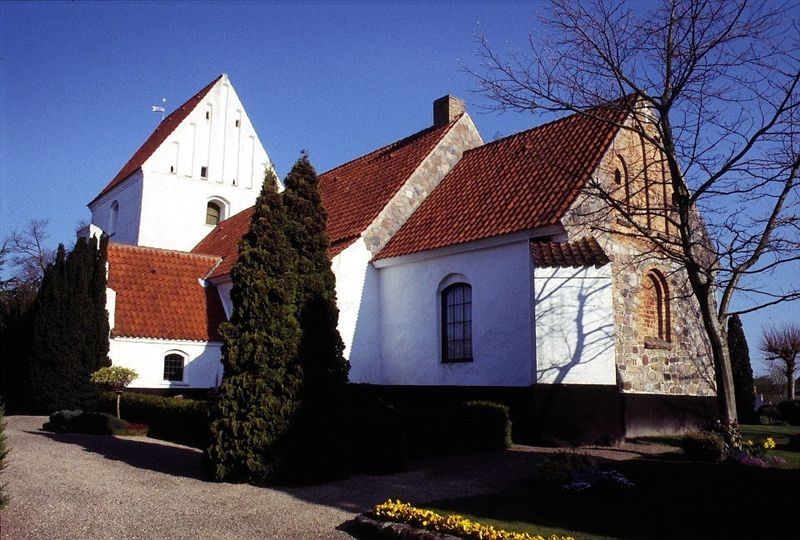 Everdrup Kirke i Danmark. Everdrup kirke